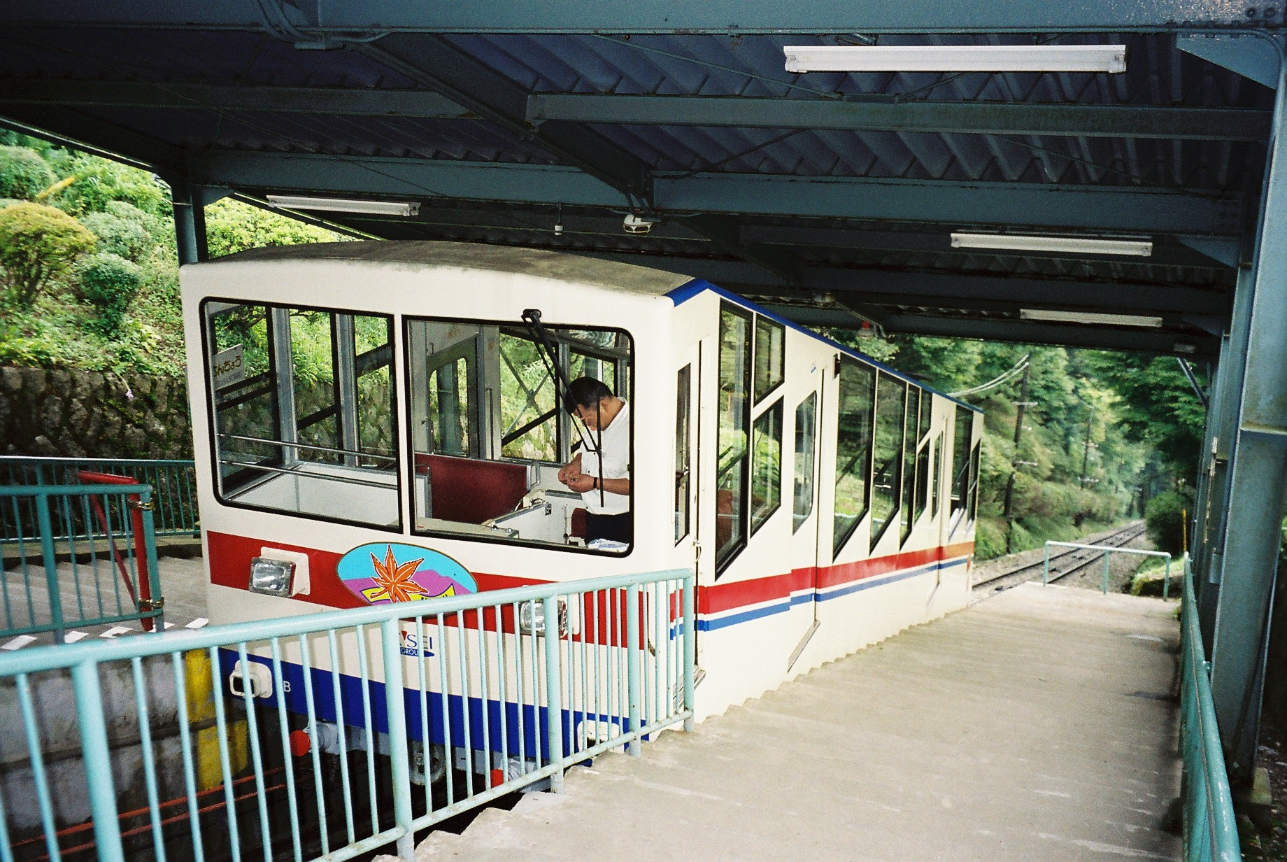 筑波観光鉄道の旧塗装